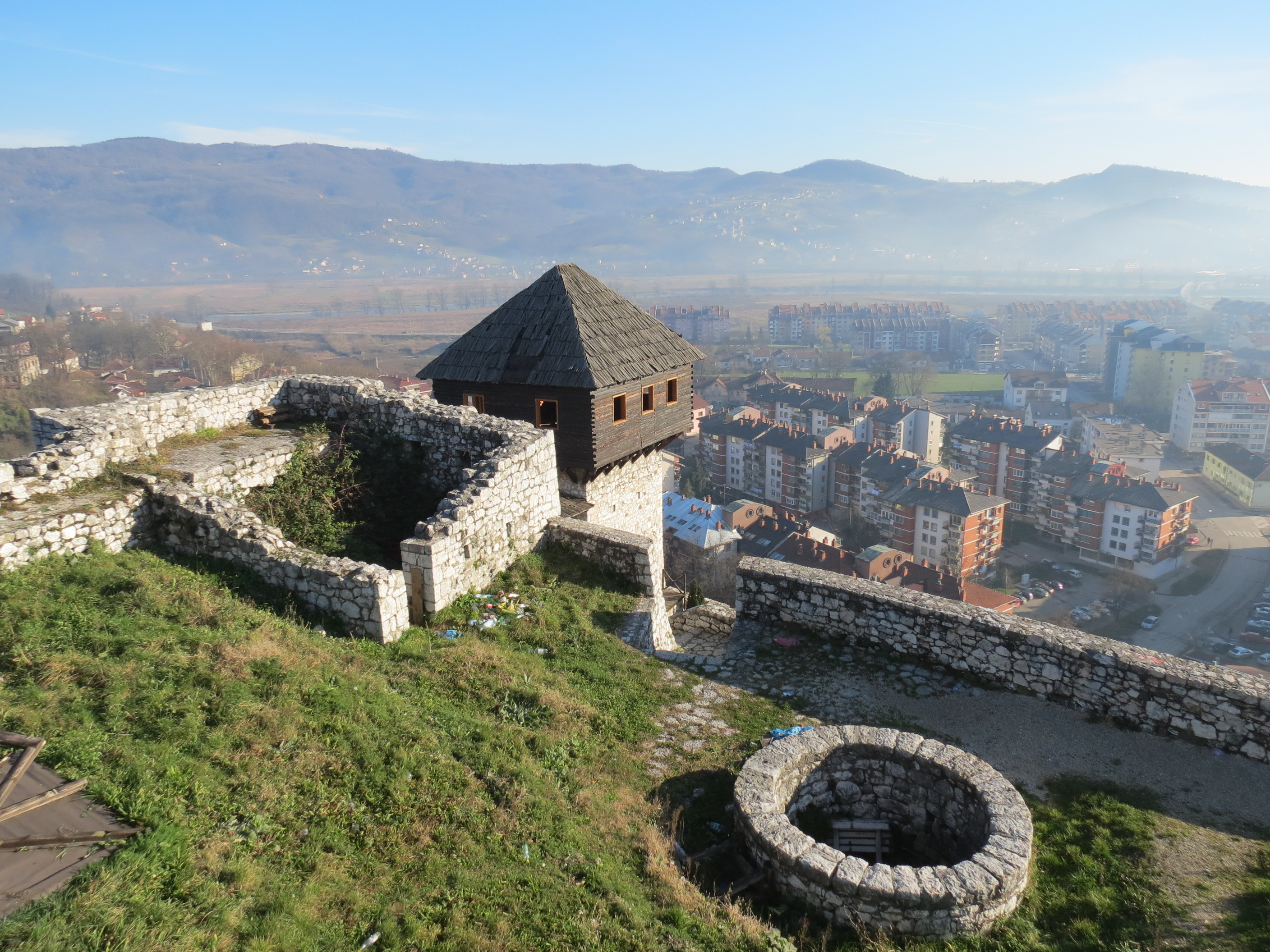 Doboj - Fortress